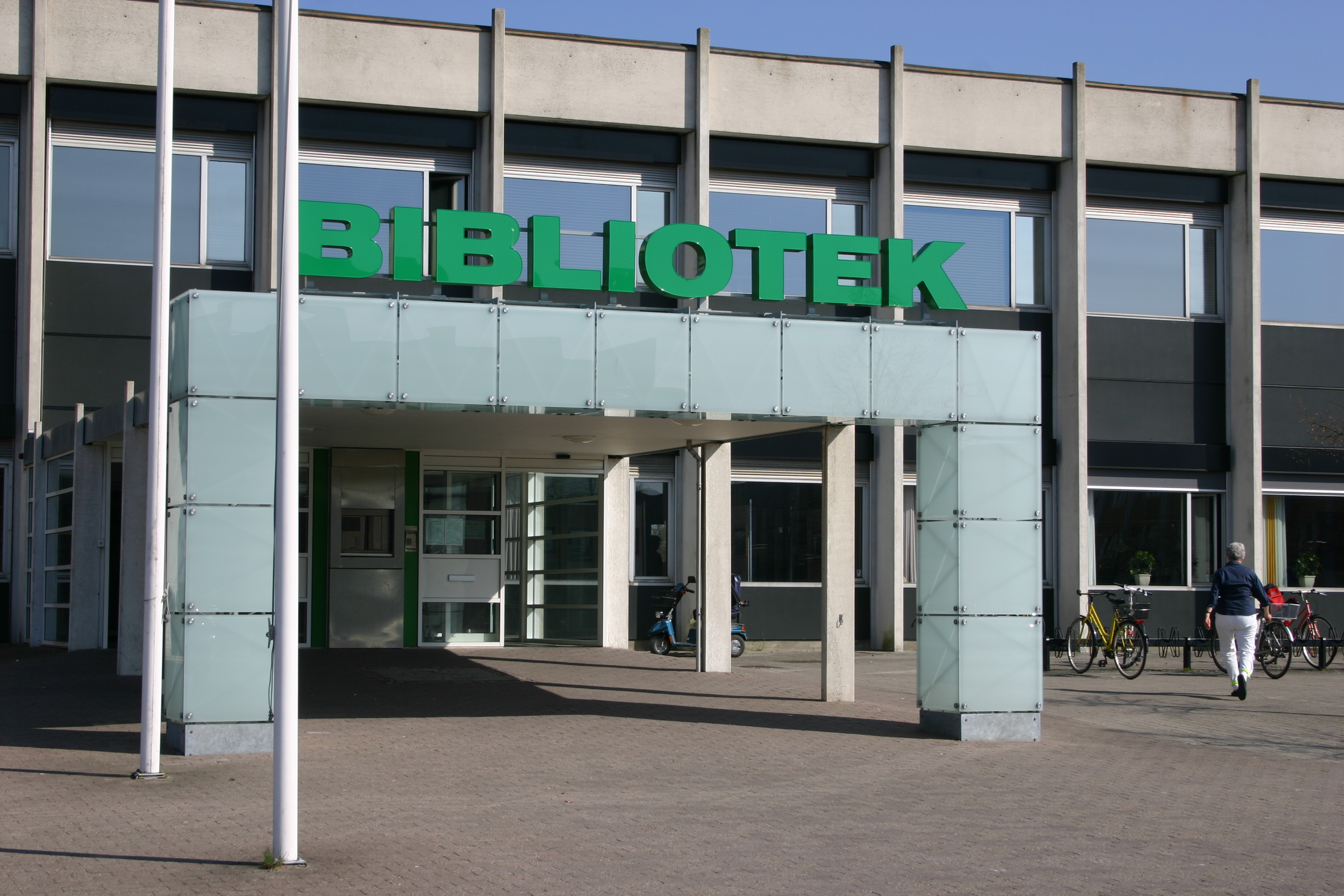 Vejle Bibliotek